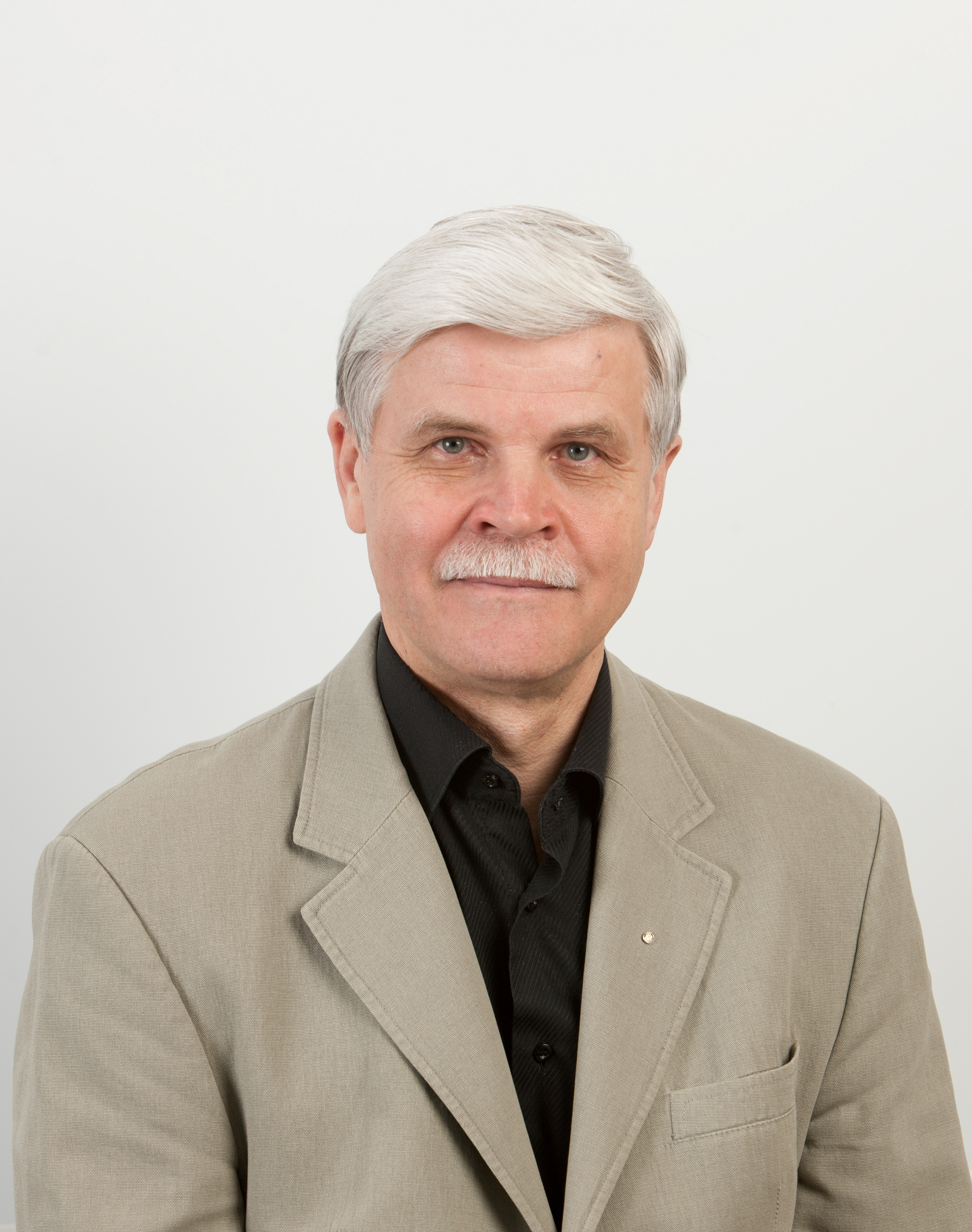 TÜ arstiteaduskonna üld- ja molekulaarpatoloogia instituut. Patoloogilise füsioloogia õppetooli professor Enn Seppet.